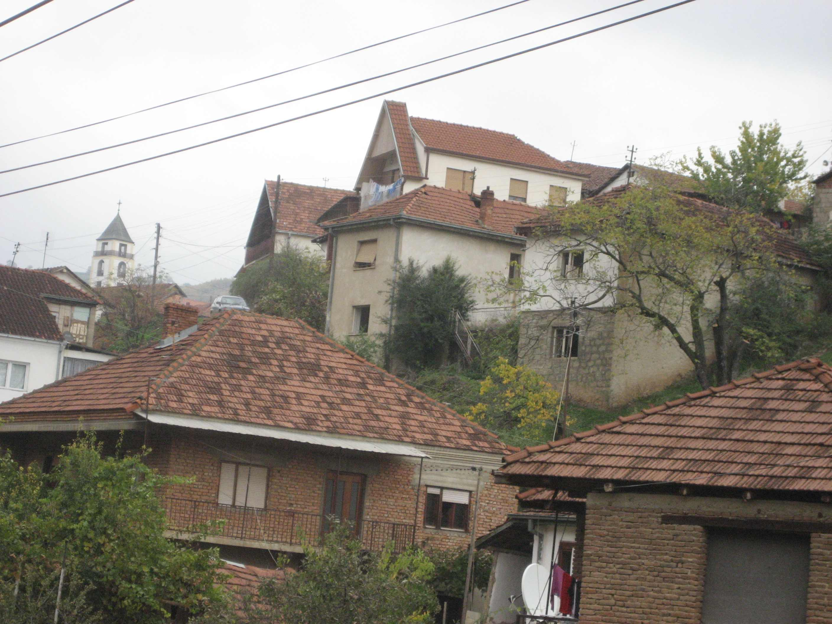 View of Janjevo